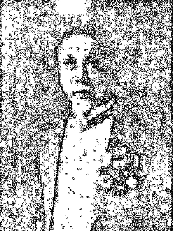 The image here is claimed to be Public Domain as it is: A portrait of one of Hong Kong's most famous politicians; The image used is of a ceremonial and not a commerical value; The article is greatly improved by the prominence of this photo; Which is hosted and displayed on the not-for-profit Wikipedia Encylopedia for educational purposes. The person in the photo died in 1921 and therefore the copyright has expired. { }